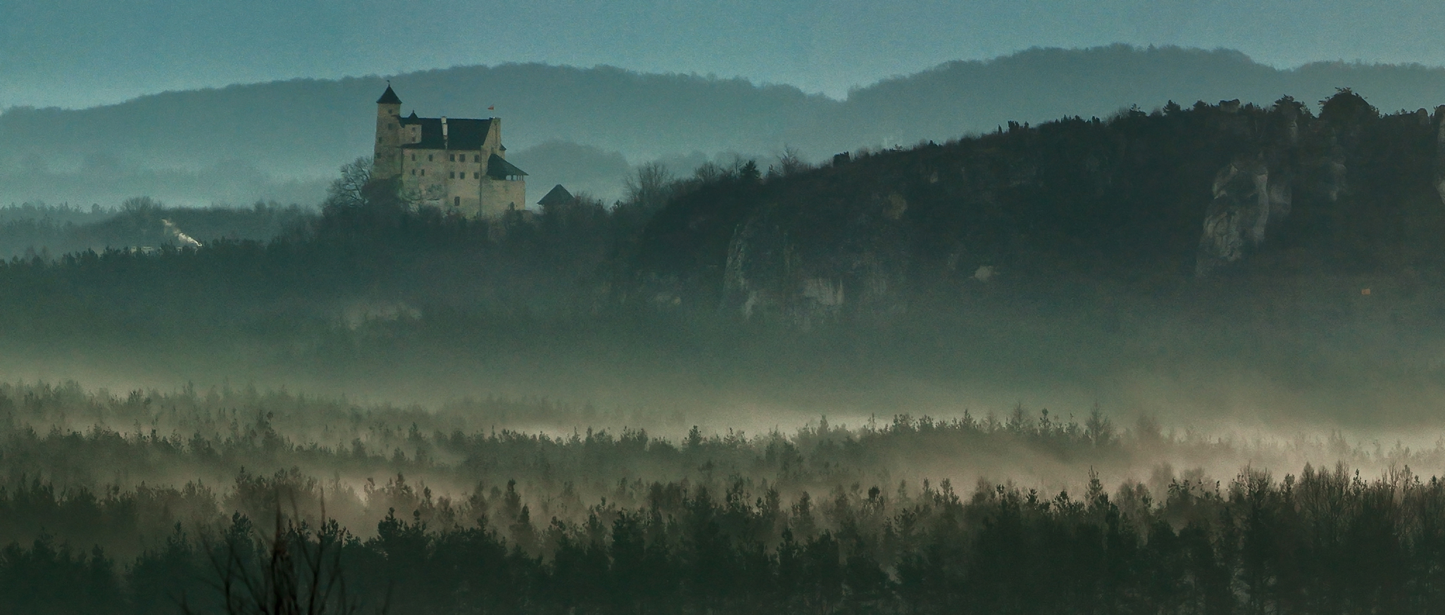 Bobolice, ruiny zamku, 2 poł. XIV, XVI, 1 poł. XVII, po 2000